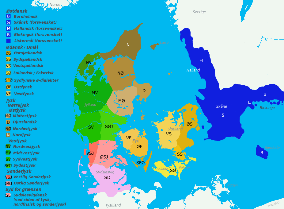 Kort over danske dialekter